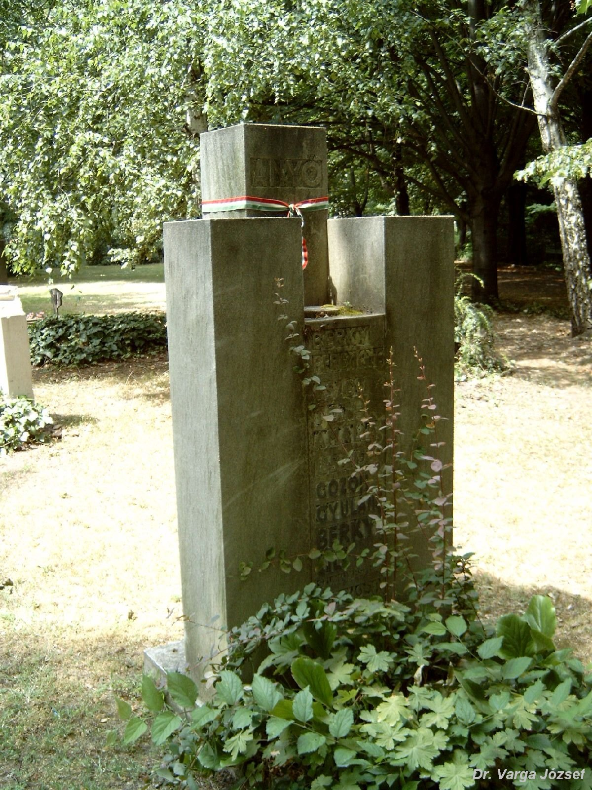 Berky Lili (Győr, 1886. március 15. - Budapest, 1958. február 5.) színésznő sírja Budapesten. Kerepesi temető: 34/2-1-36